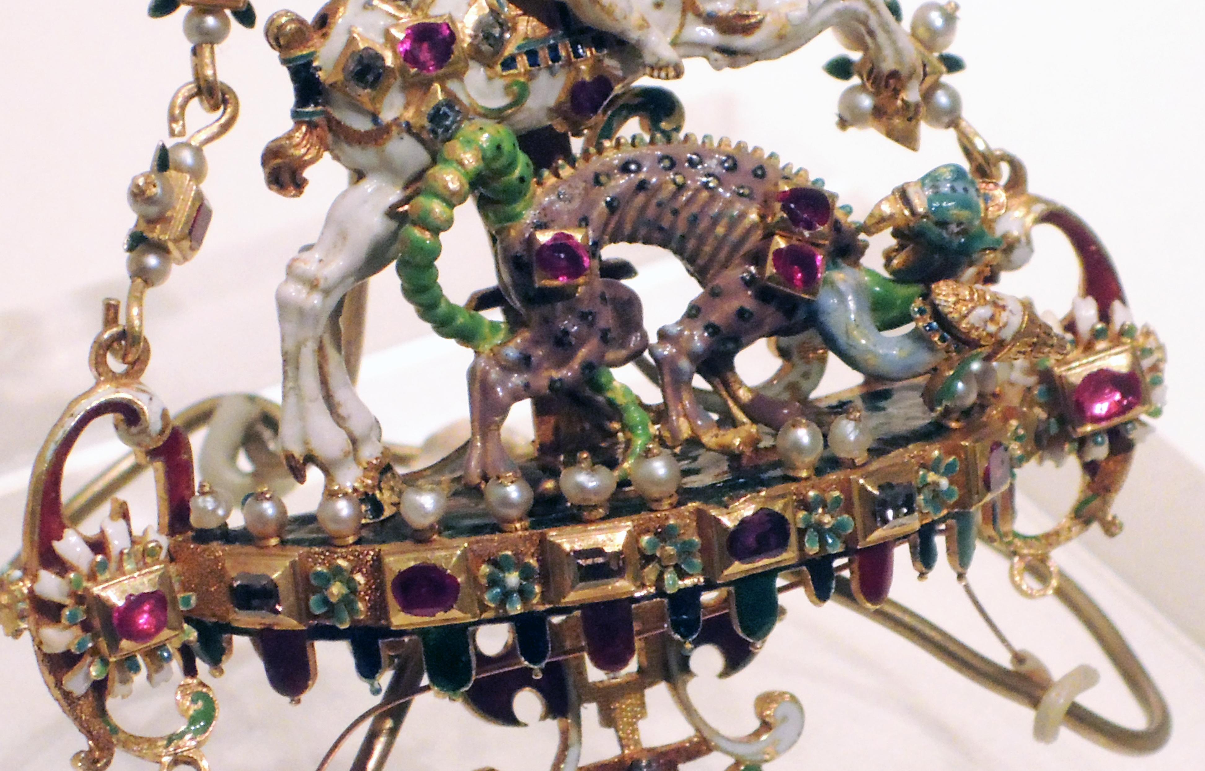 Т.н. "Орден Подвязки Ивана Грозного"